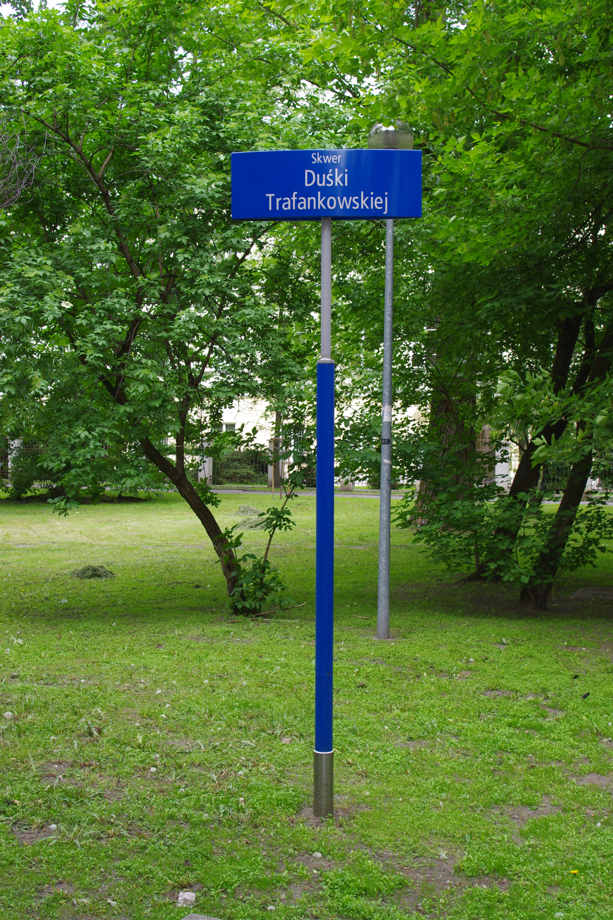 Skwer Duśki Trafankowskiej w Warszawie, w Śródmieściu upamiętniający aktorkę Darię Trafankowską